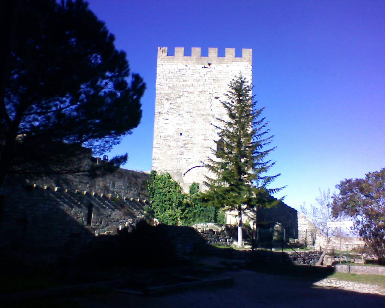 Pisana Tower inside Lombard Castle, Enna, Italy-Torre Pisana dentro il Castello di Lombardia, Enna, Italia